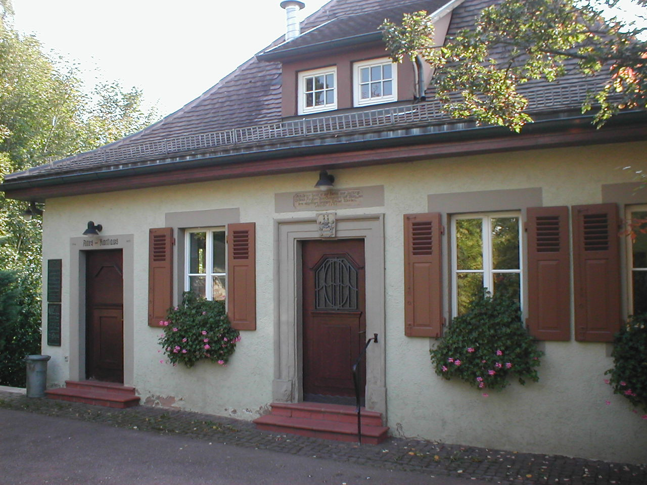 Pfarrhaus in Neuenstadt-Bürg, erbaut 1767, Rathaus 1906-1982